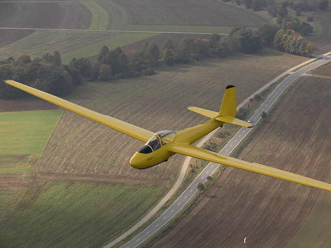 Lunak über der schwäbischen Alb